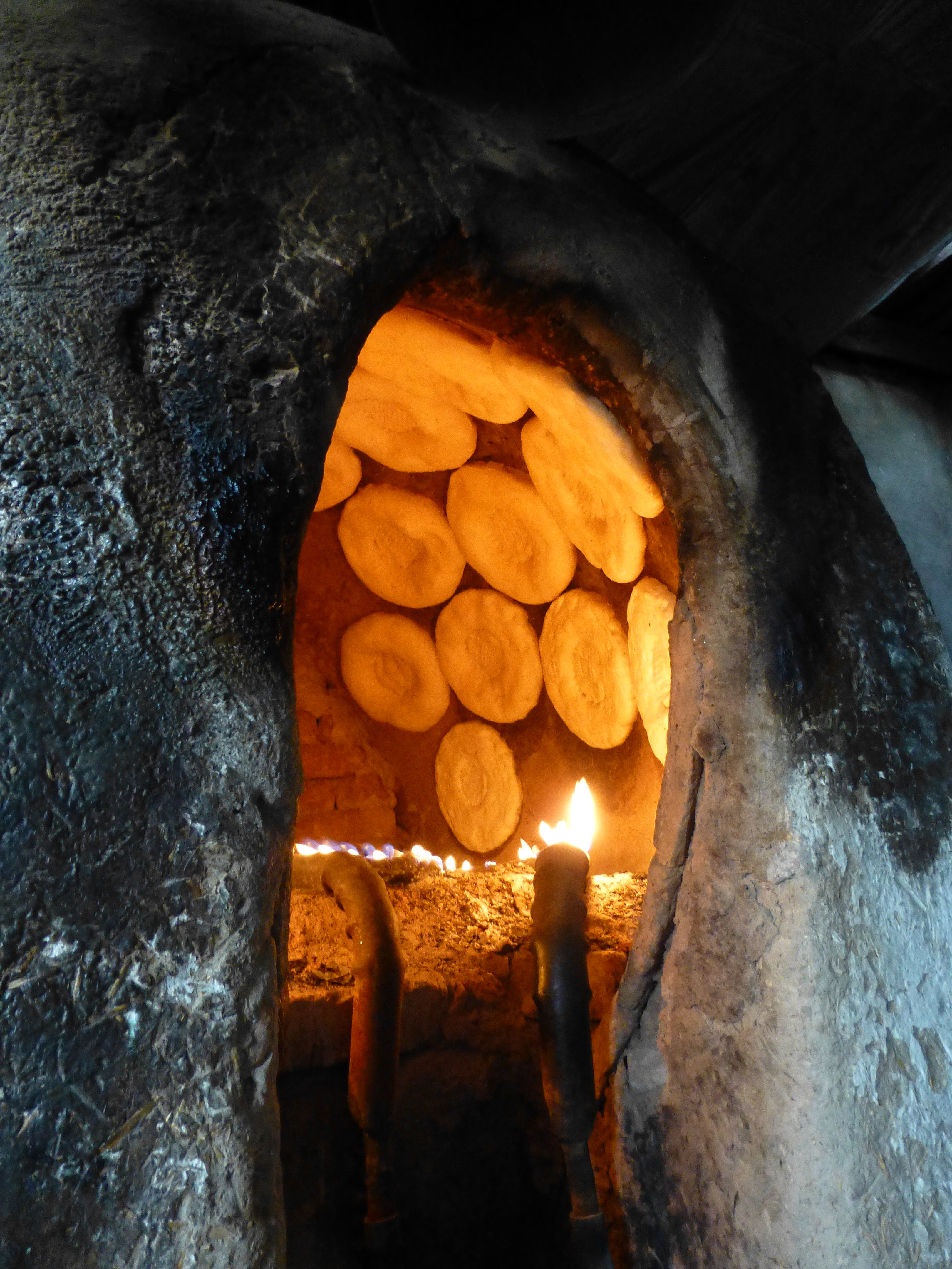 Samarcande (Ouzbékistan) : fabrication du pain (non)